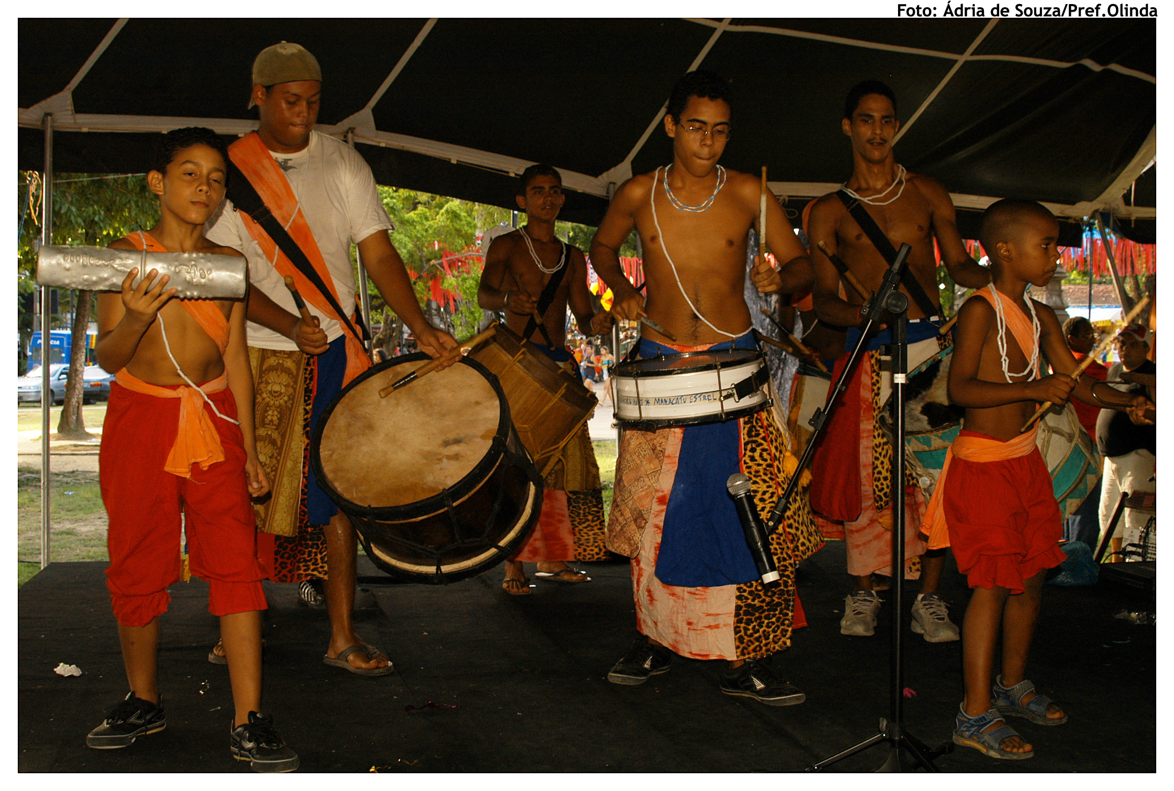 Percussionistas agitaram o pólo infantil ao som de um ritmo contagiante. Foto: Ádria de Souza/Pref.Olinda